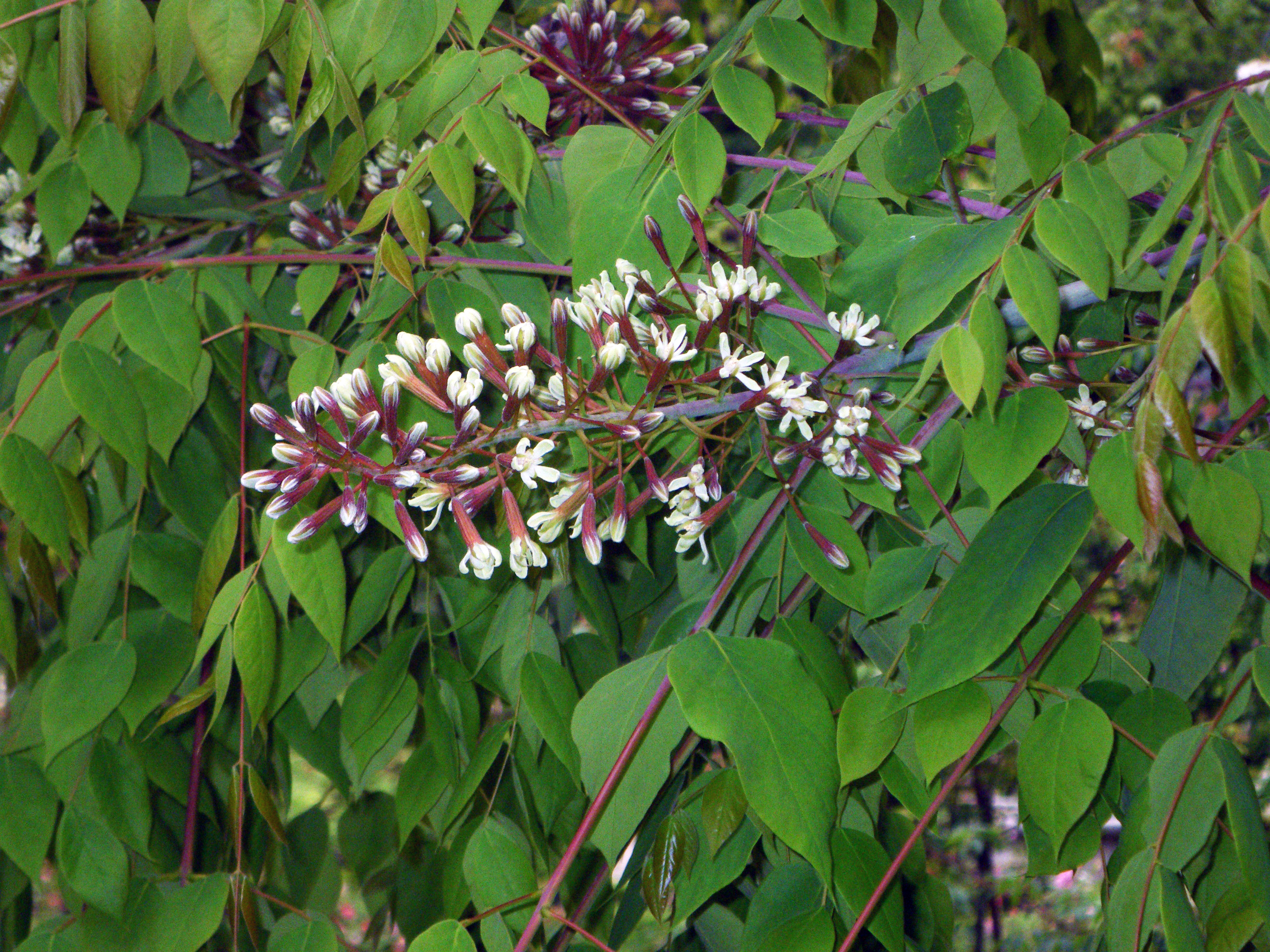 Gymnocladus dioicus, Real Jardín Botánico, Madrid, España.